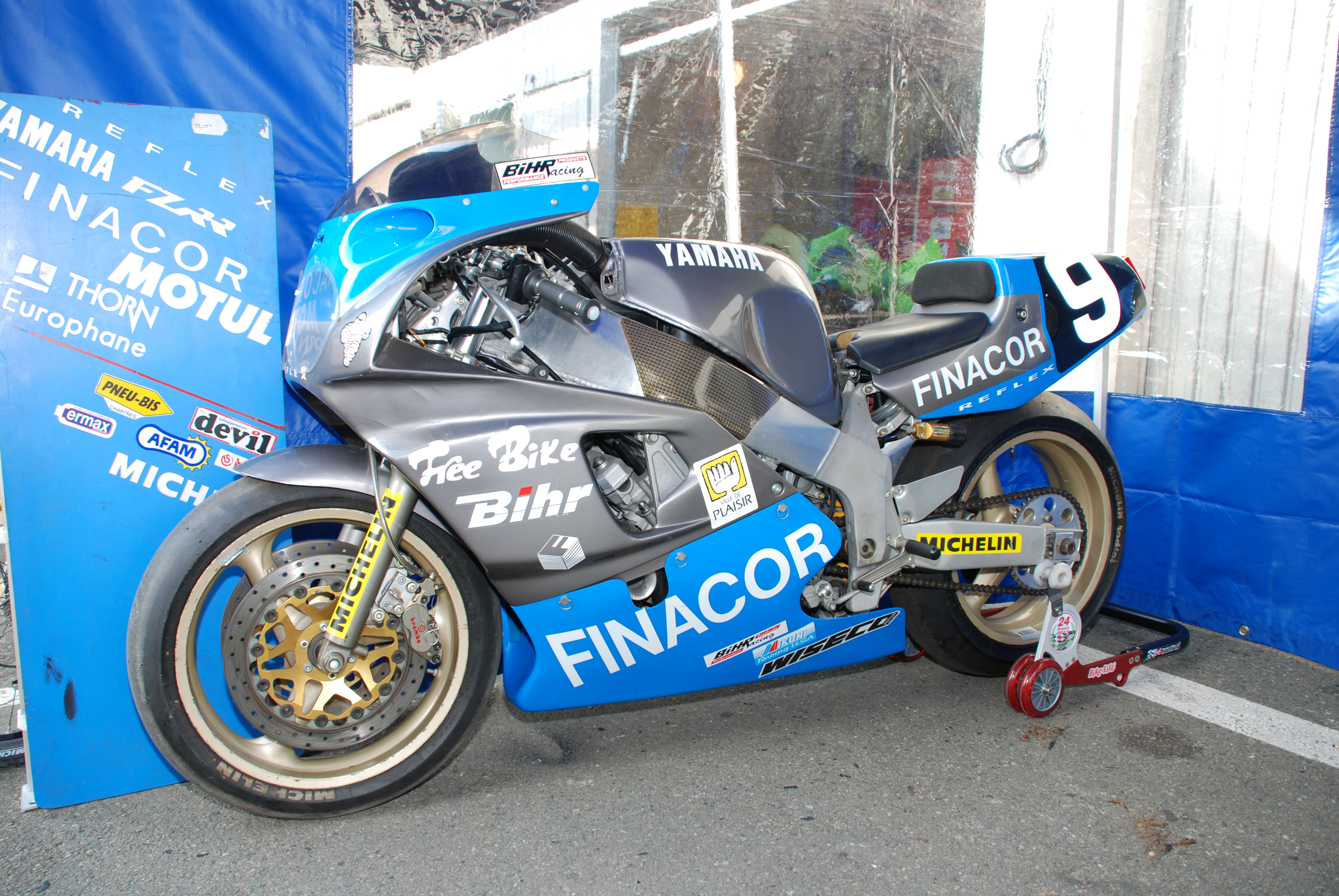 Yamaha vainqueur des 24 heures du Mans 1991 (Philippe Monneret)